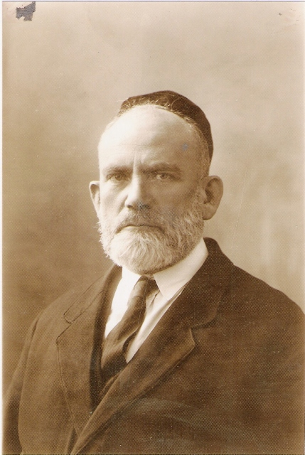 יואל ברשד, 1873-1943 צפת